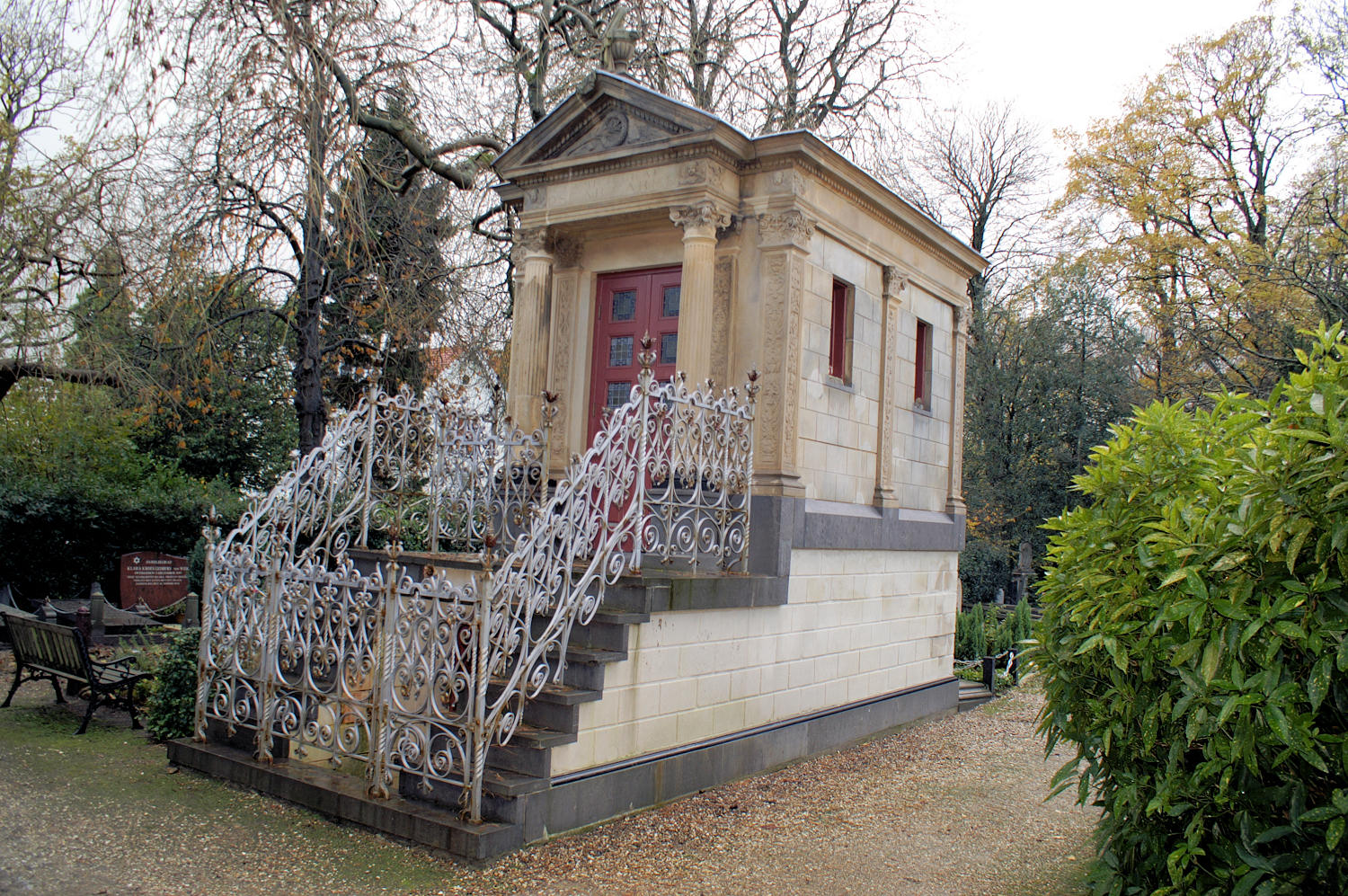 Foto gemaakt door Han Fraijman Almere